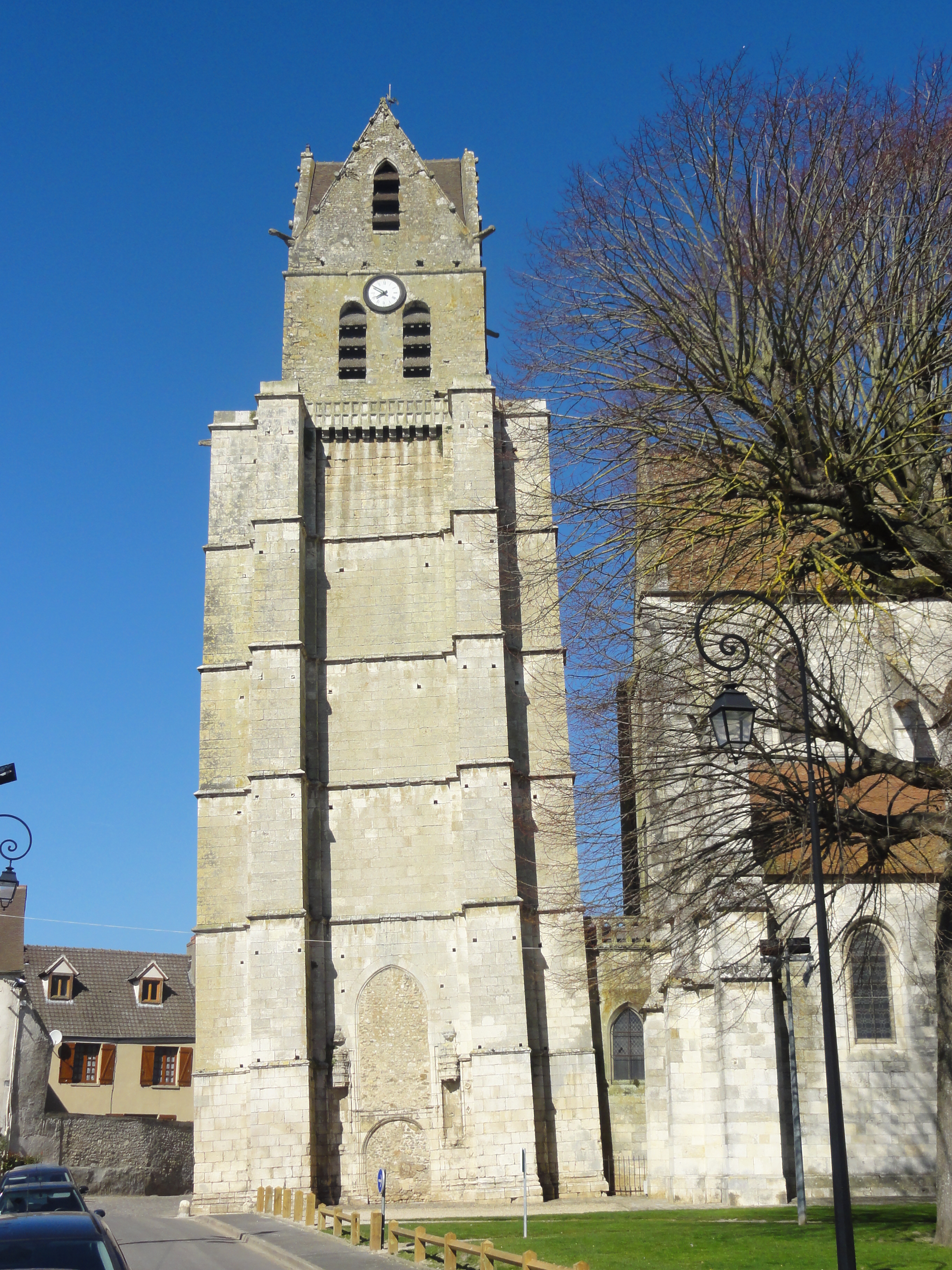 Clocher, vue depuis le sud.